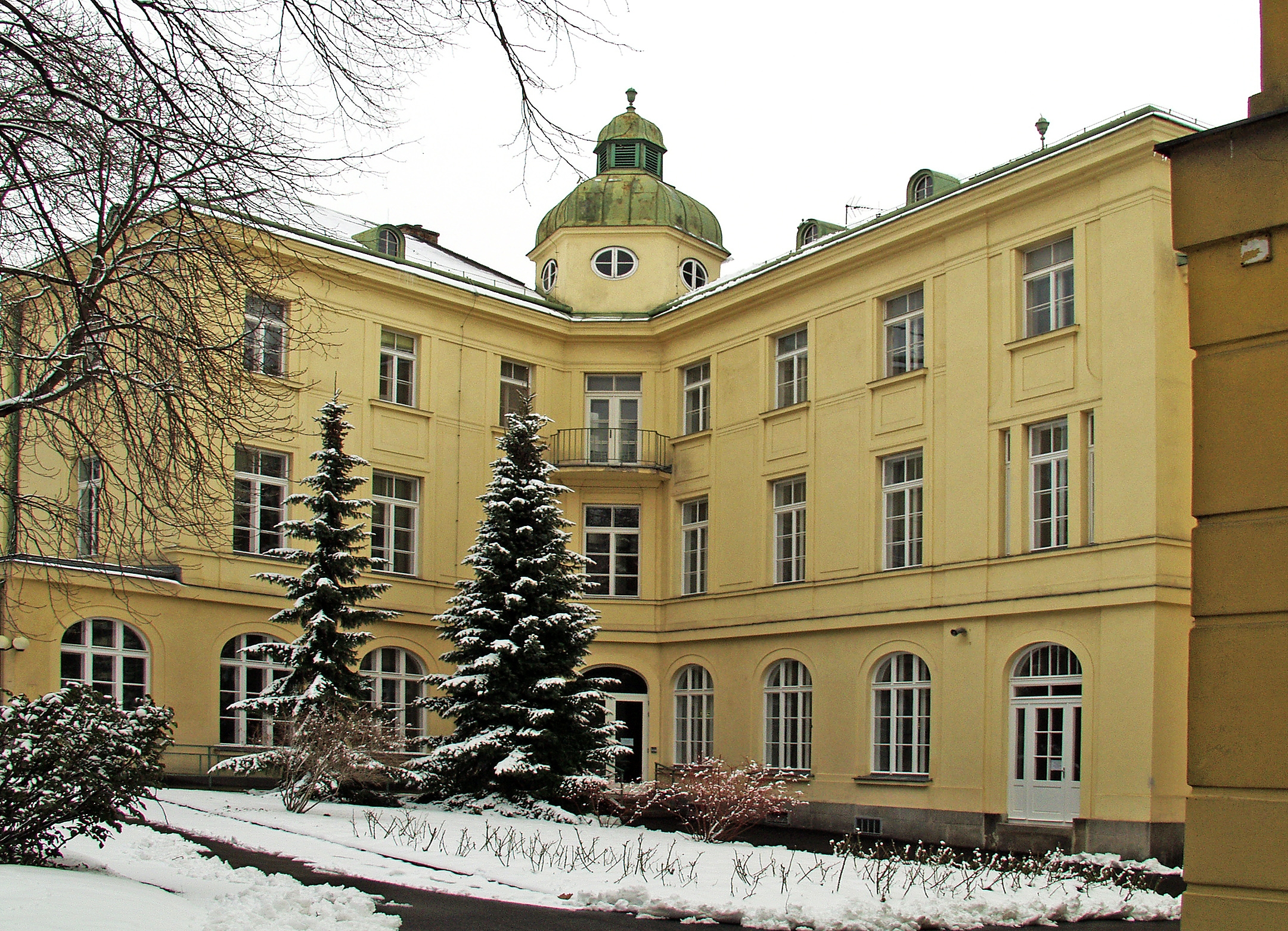 בווינה אוסטריה